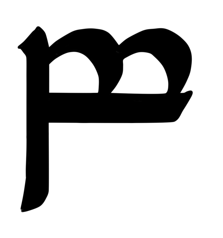 a mano